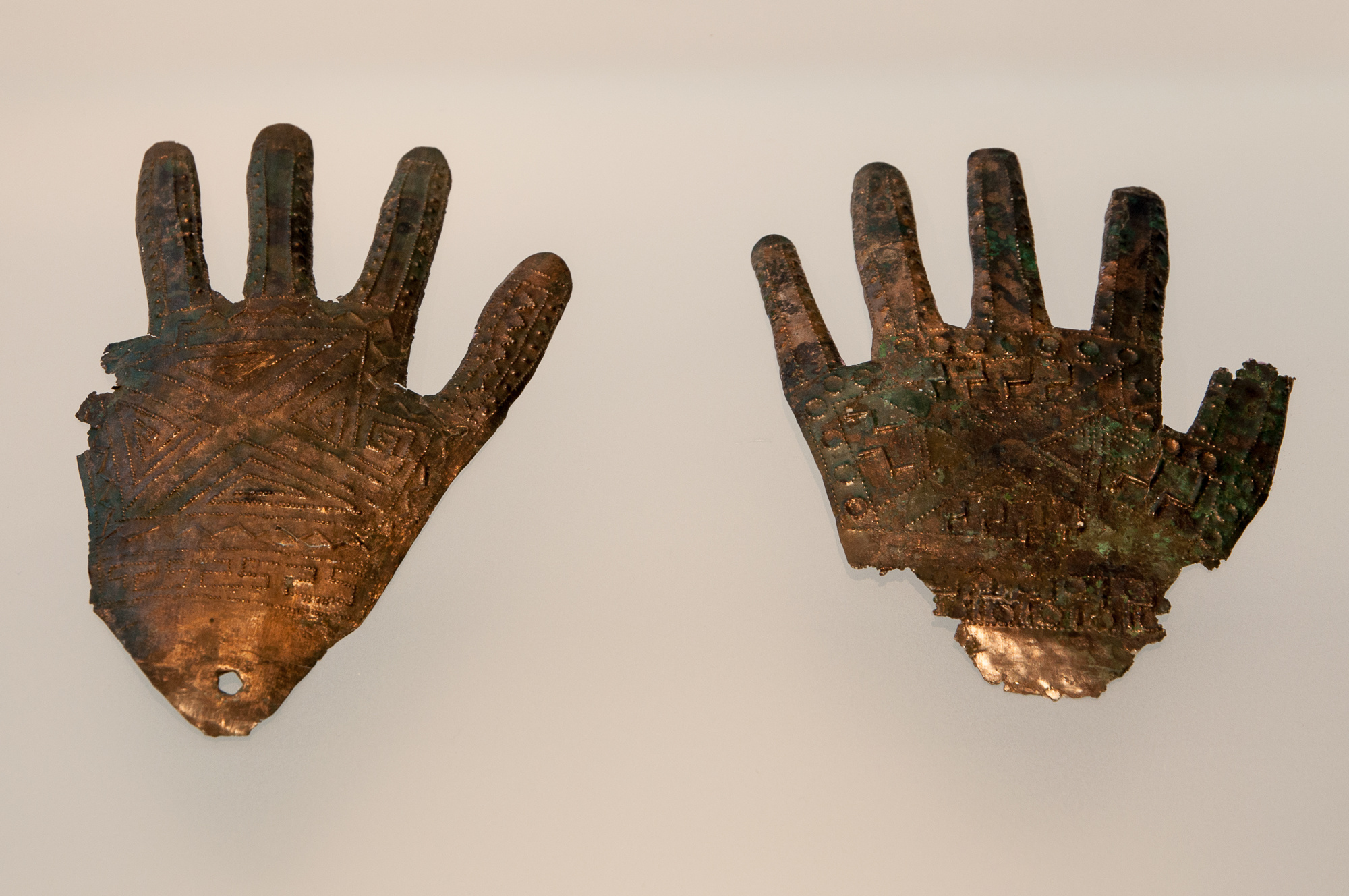 Bronzene Blechhände aus Kleinklein bei Großklein, Österreich. Jüngere Hallstattzeit, 1. Drittel 6. Jh. v. Chr.